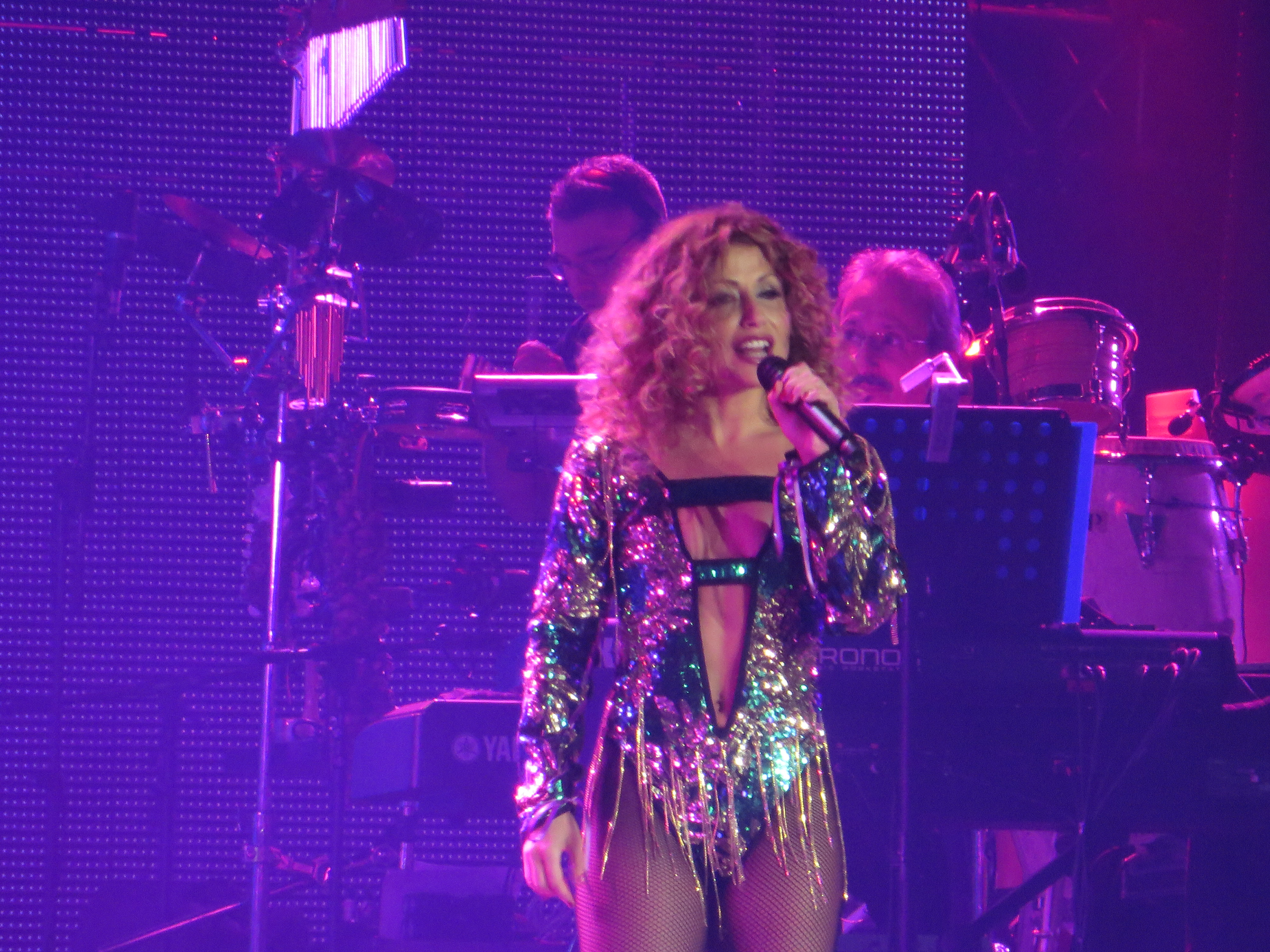 Actuación de Veronica en el concierto conmemorativo del 15 aniversario de OT en el Palau Sant Jordi de Barcelona (31-10-2016)